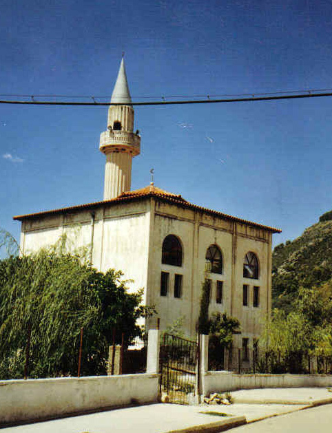 Moschee der albanischen Kleinstadt Delvina